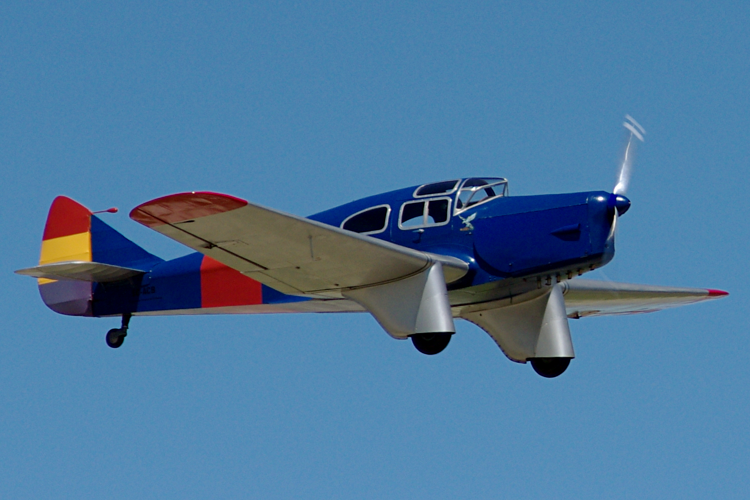 Miles Falcon de la Fundación Infante de Orléans en el aeródromo de Madrid-Cuatro Vientos.